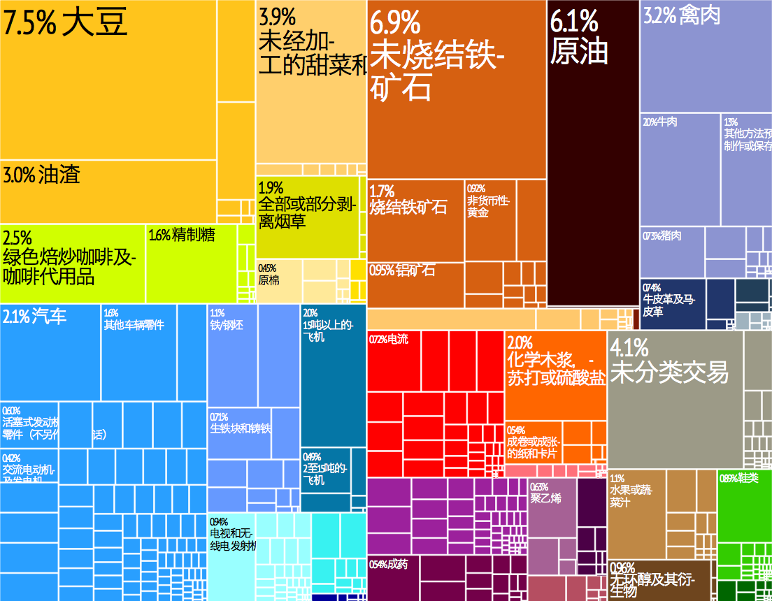 以28种颜色分类描述此国的产品出口，每种颜色盒代表一类产品，其大小代表此产品在此国总出口产品中的比重。